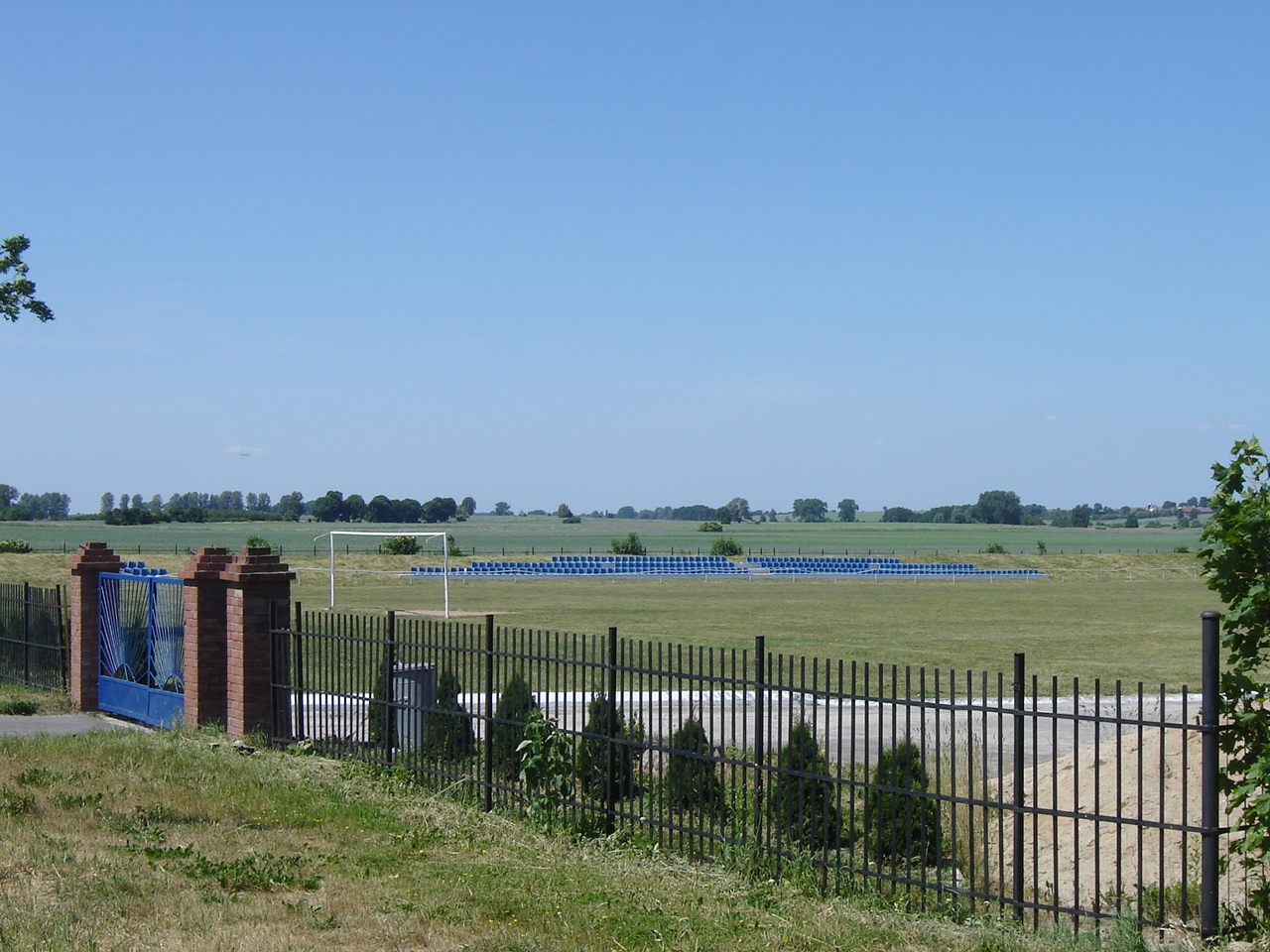 Boisko piłkarskie w Suchaniu